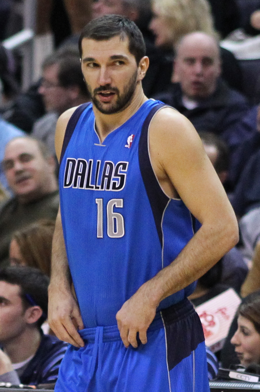 Wizards v/s Mavericks 02/26/11